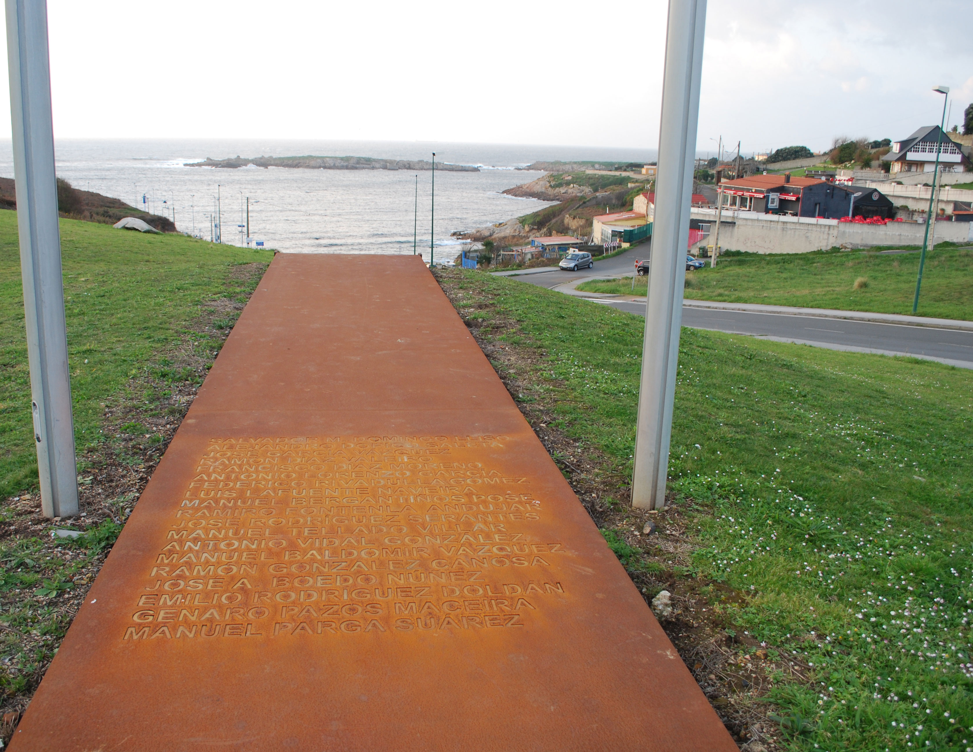 Monumento aos mártires do Portiño A Coruña Galiza Spain